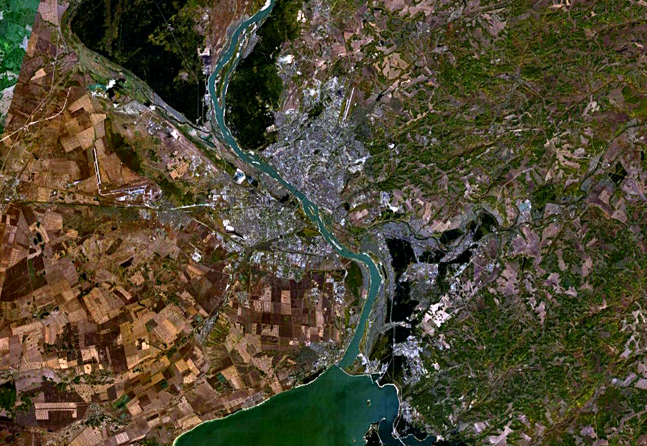 Новосибирск и окрестности из космоса